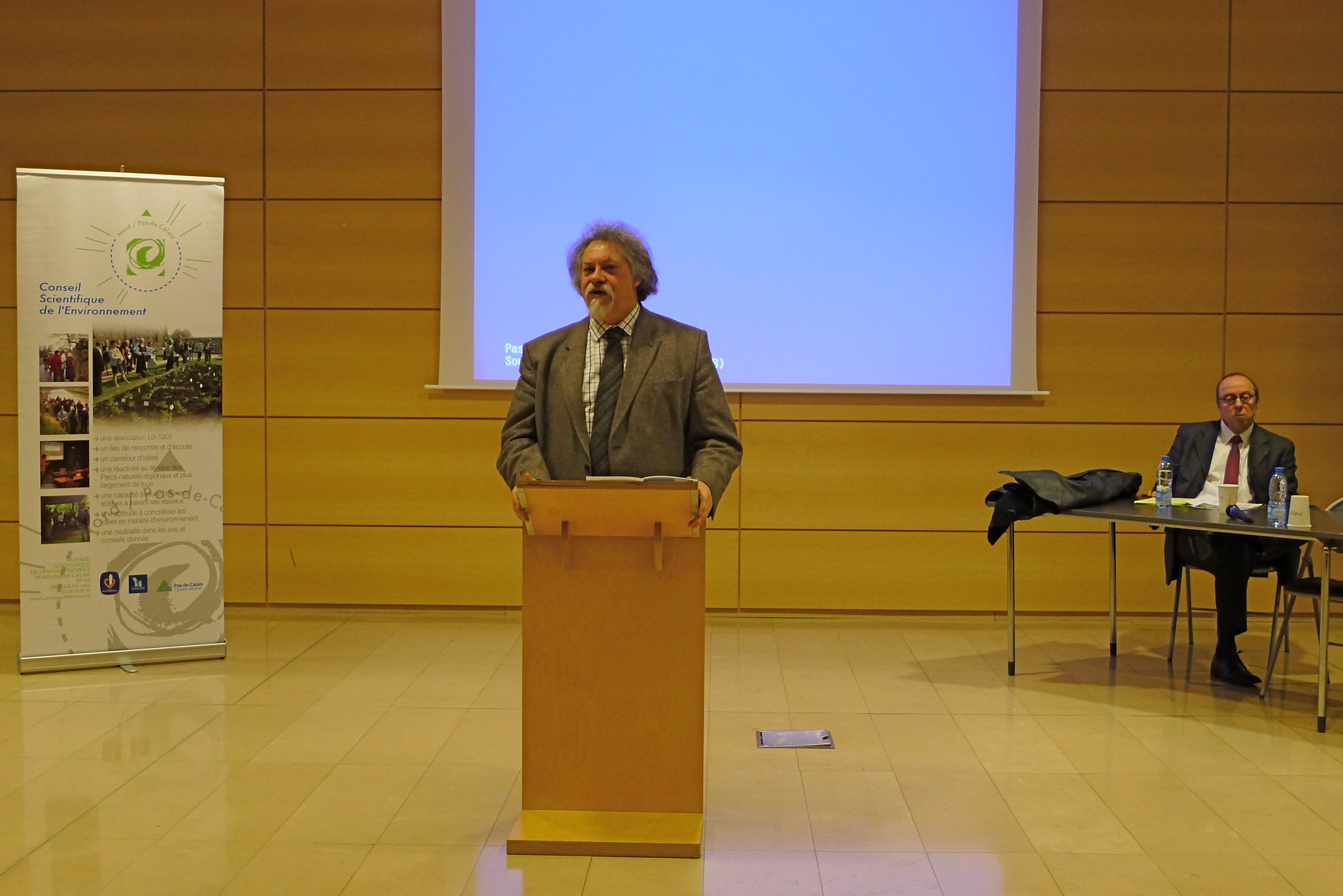 CSENPC conférence